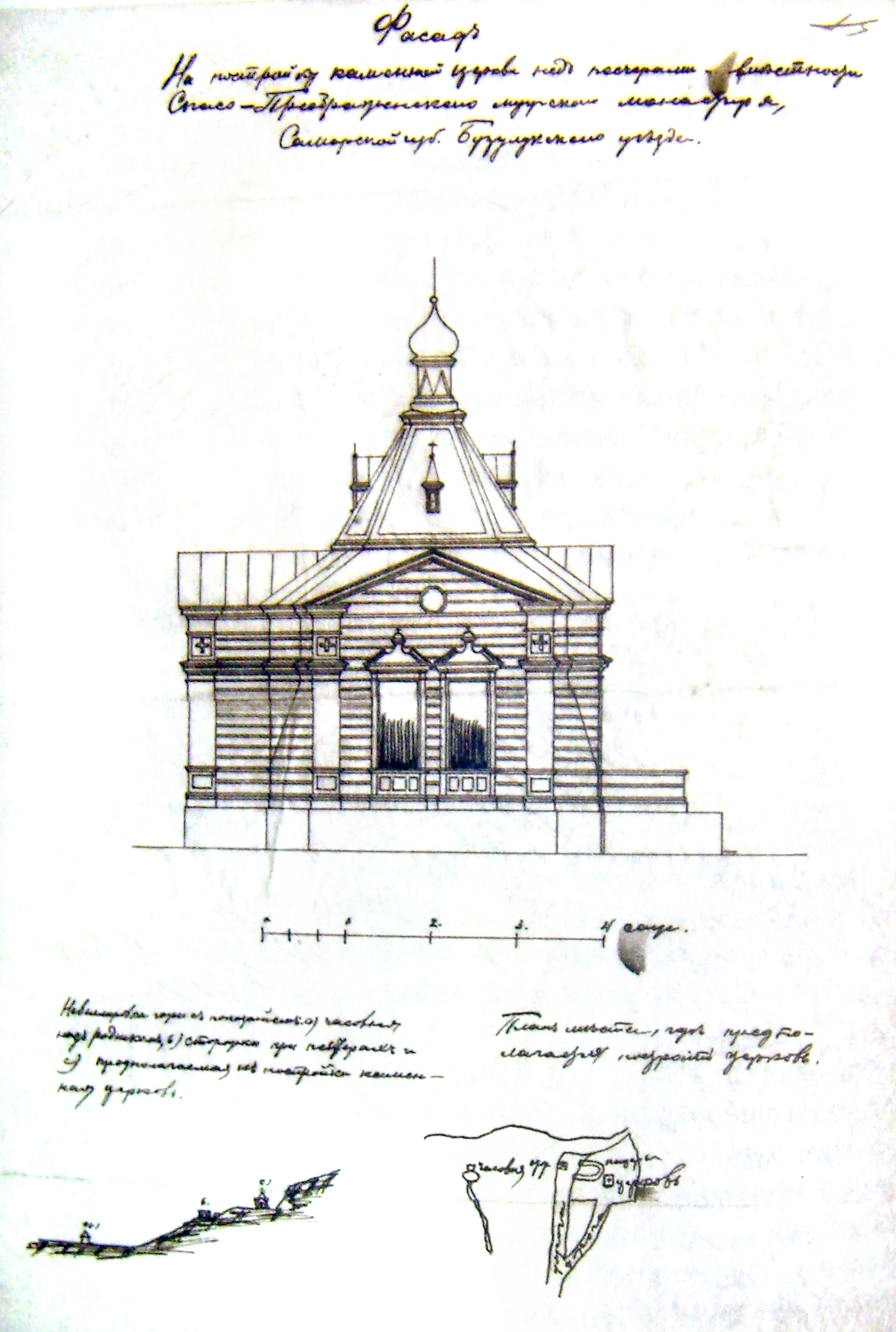 Эскиз фасада церкви над пещерами при Бузулукском Спасо-Преображенском монастыре